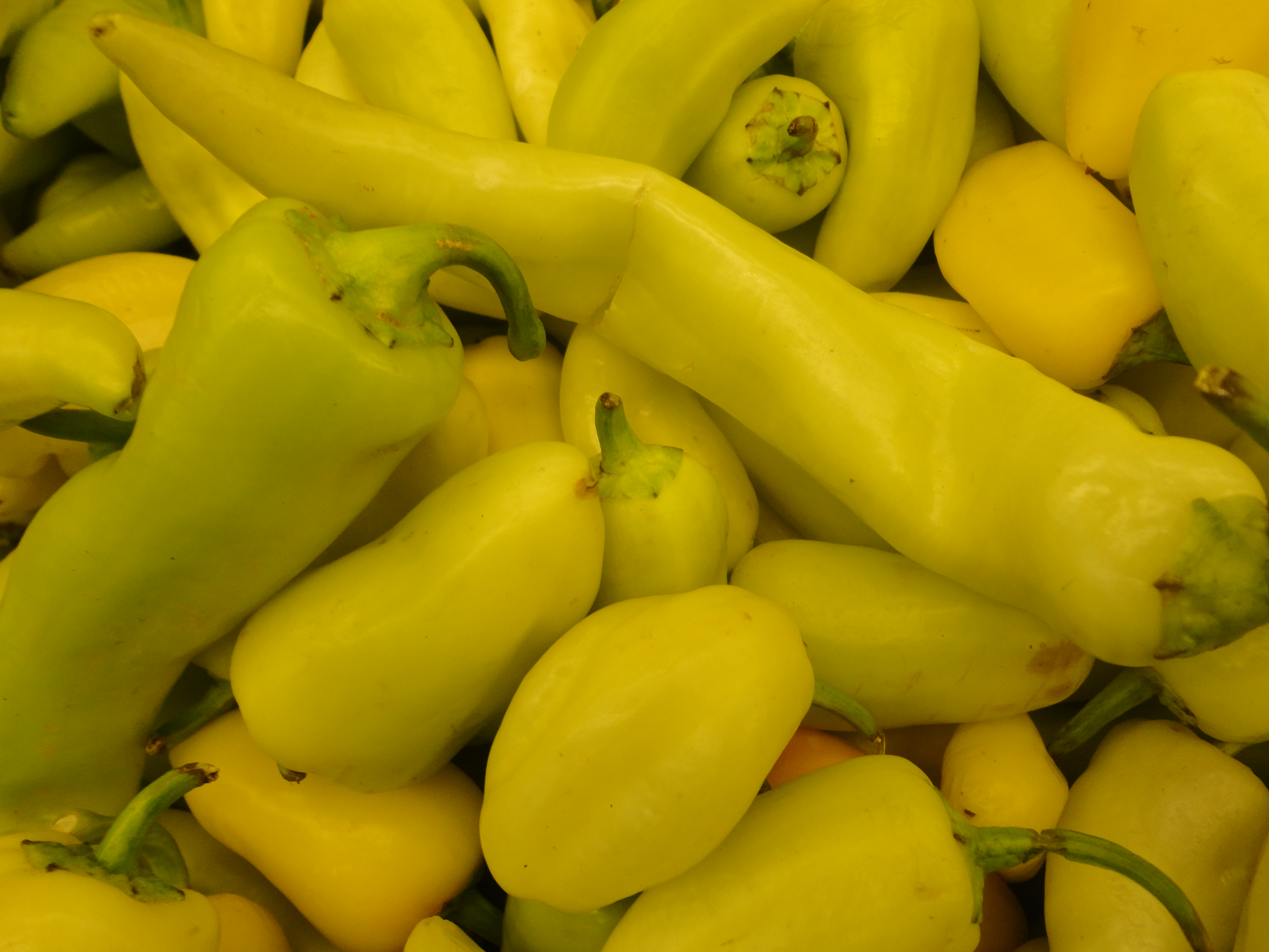 Chile Guero